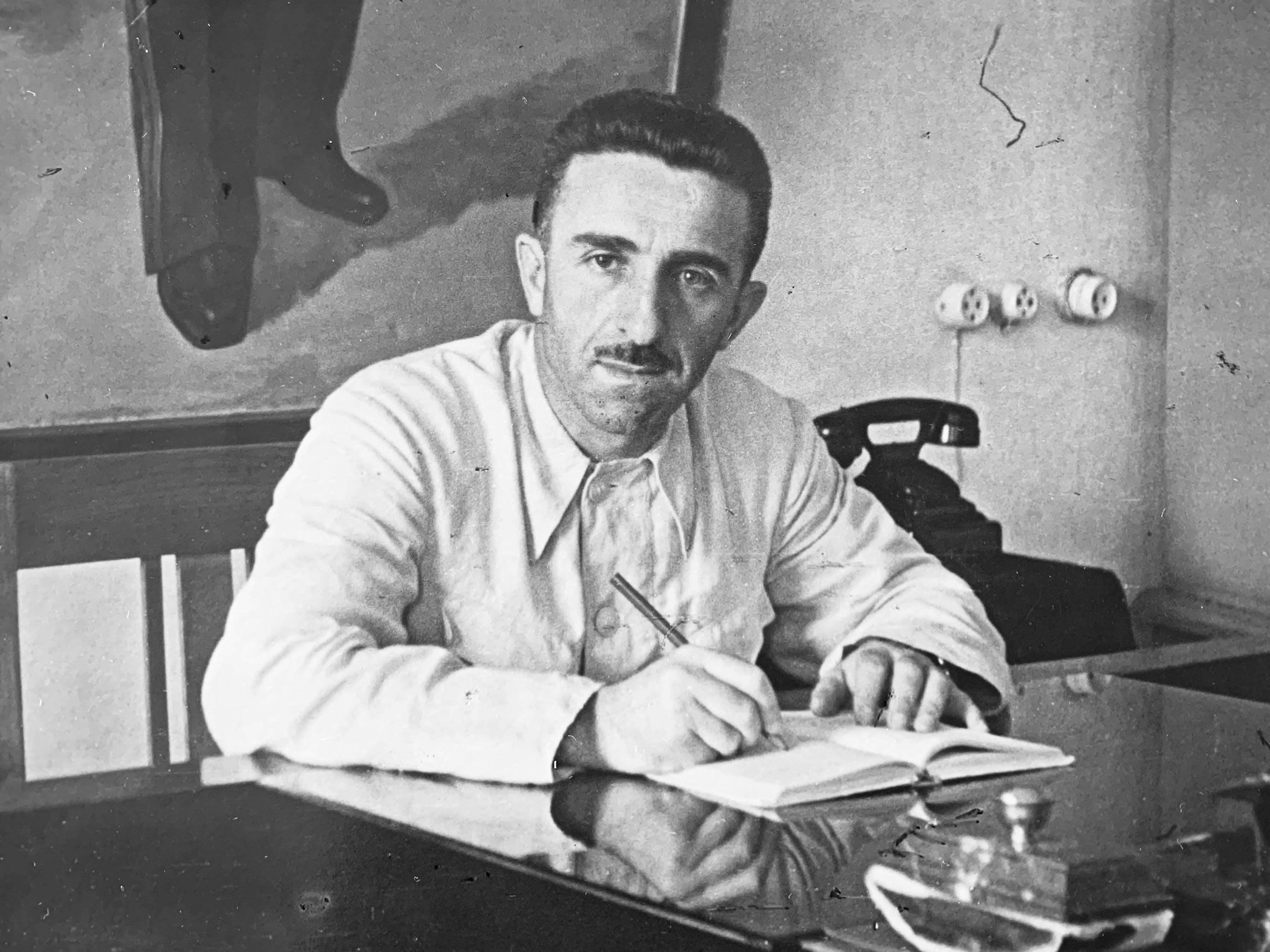 Балавадзе Василий Константинович,1911 года рождения, советский хозяйственный, государственный и политический деятель. 1-й секретарь Тбилисского городского комитета КП(б) Грузии 1952 — 18 апреля 1953